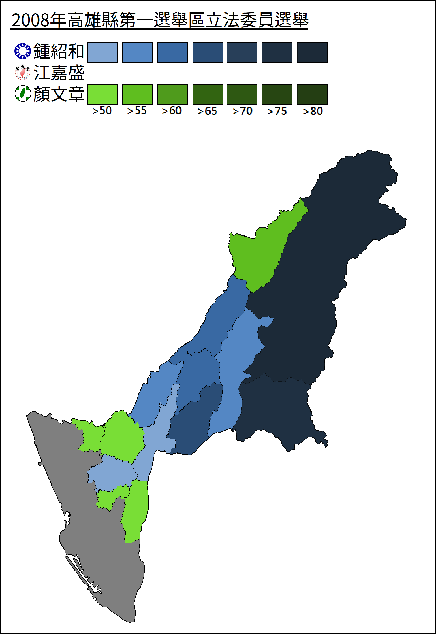 2008年高雄縣第一選舉區立法委員選舉得票